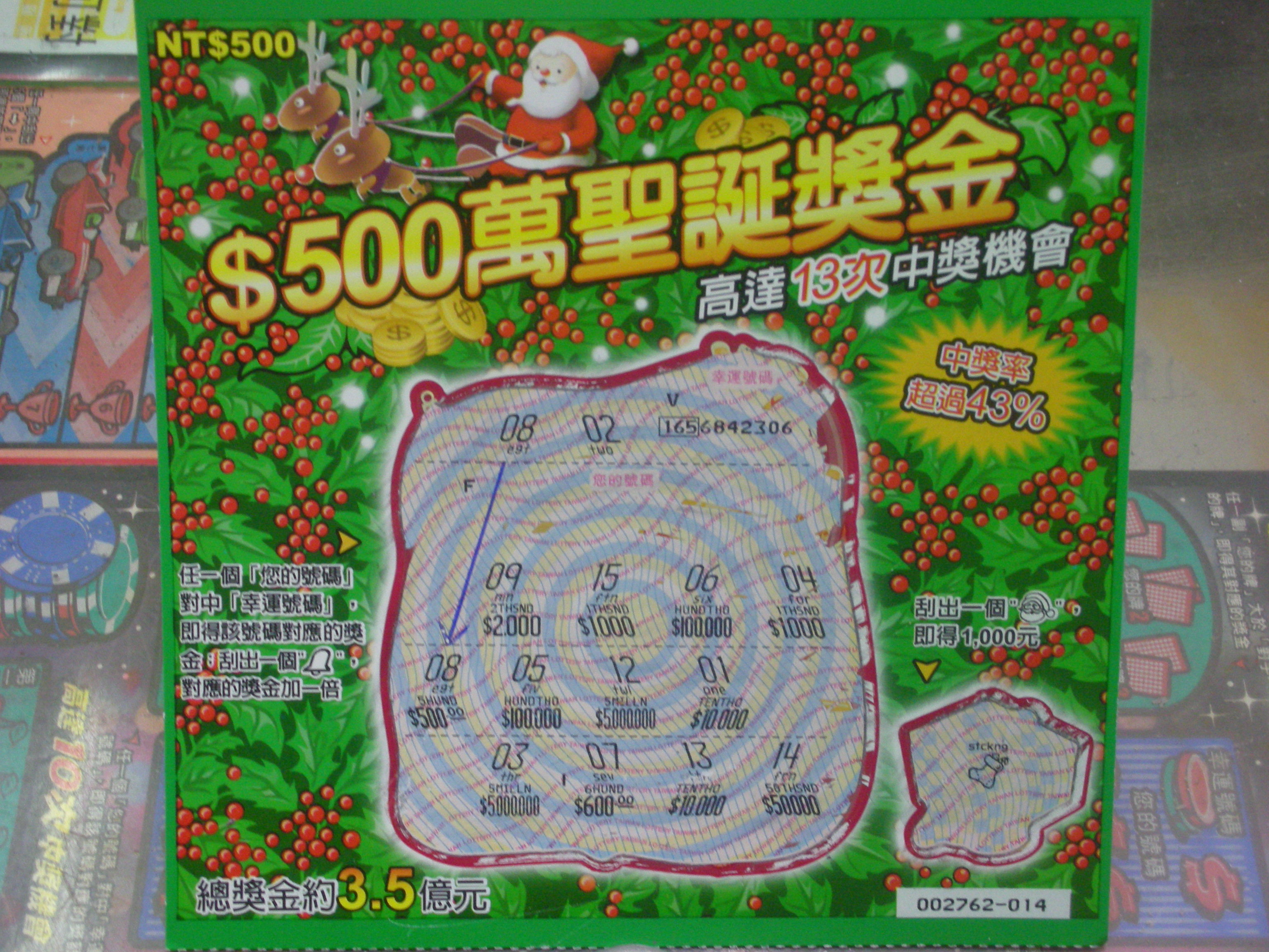 聖誕節中獎500元刮刮樂彩券